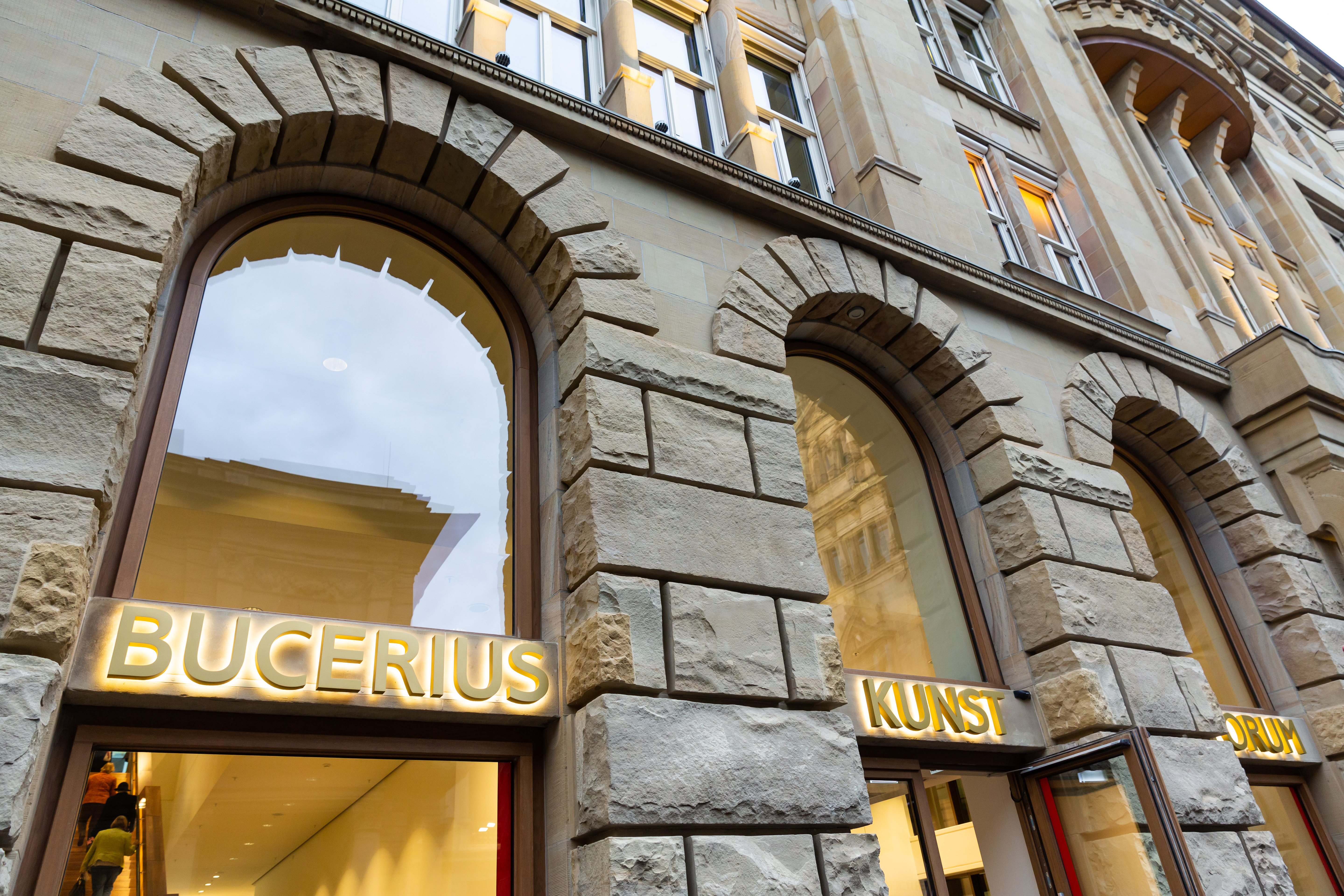 Außenfassade Bucerius Kunst Forum